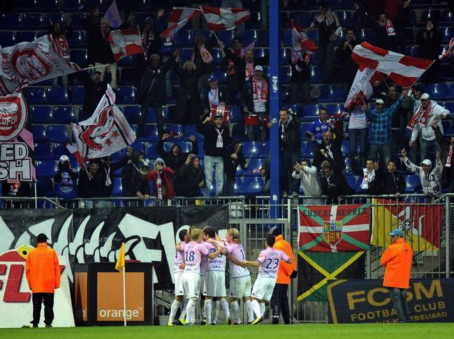 a sochaux